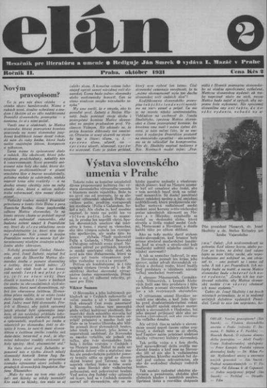 Titulný list mesačníku Elán.